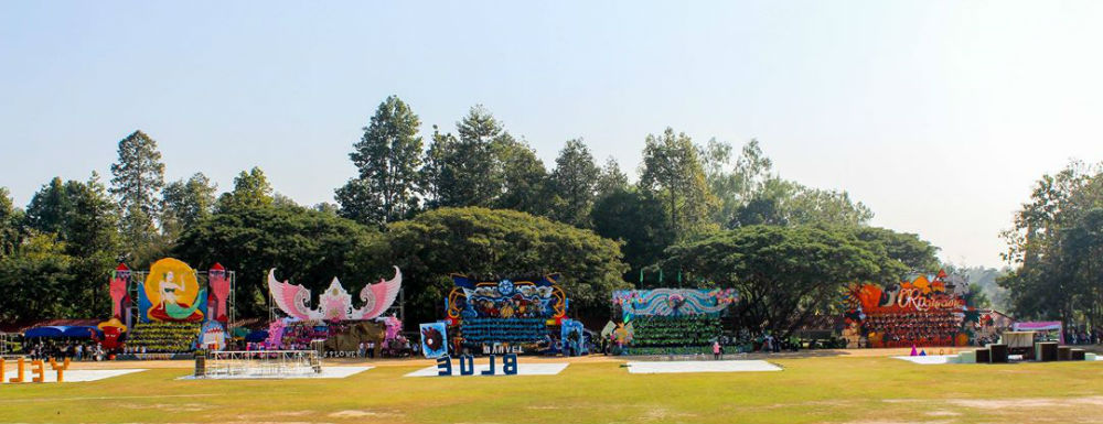 สแตนเชียร์กรีฑาสี ส.ว.57